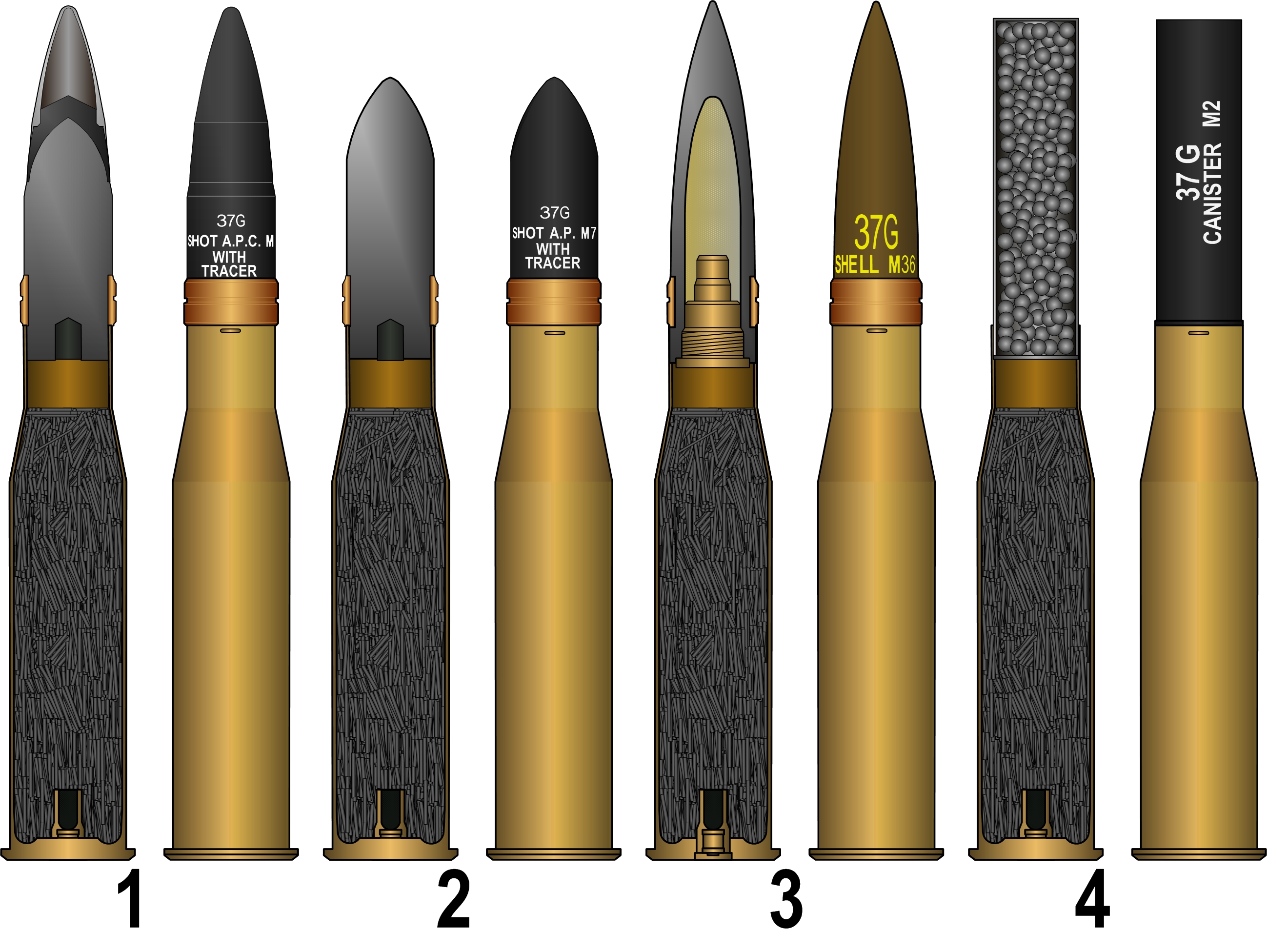 снаряды к 37мм противотанковой пушке м3